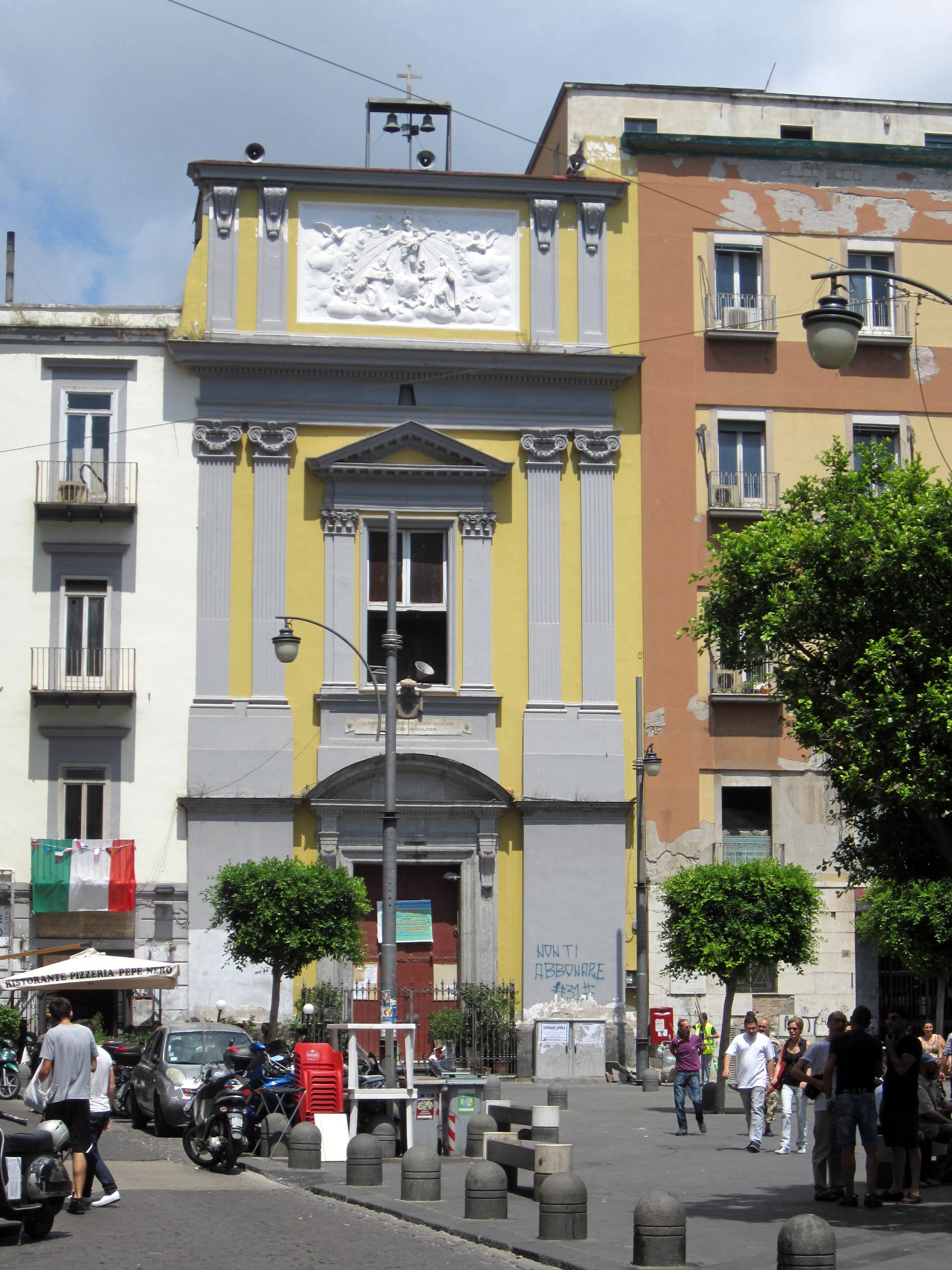 Chiesa di Santa Maria della Carità a Napoli